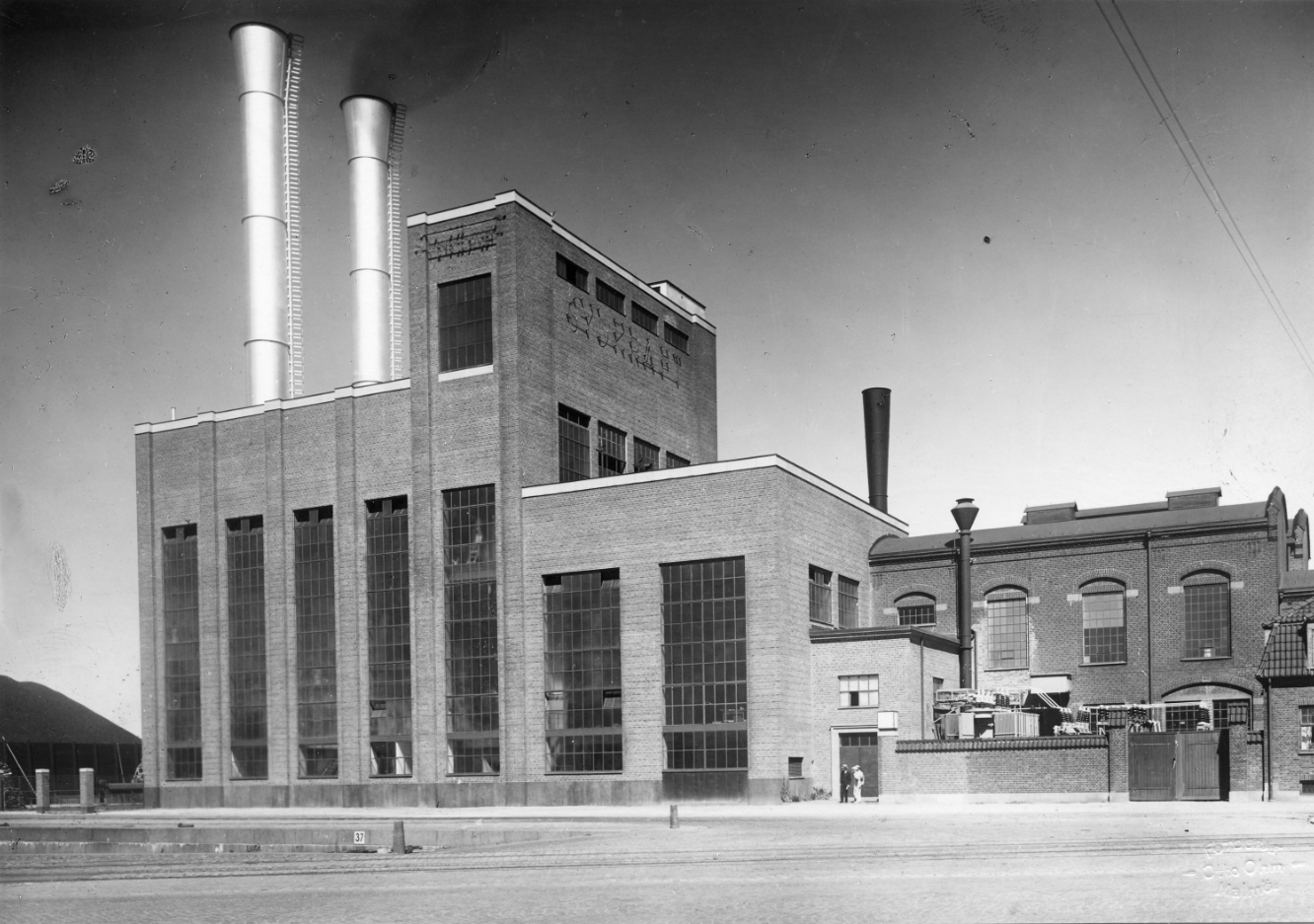 Sydkrafts ångkraftverk, Malmö. Byggnadsår 1933 Arkitekter: Nils A. Blanck & Karl Ljunggren